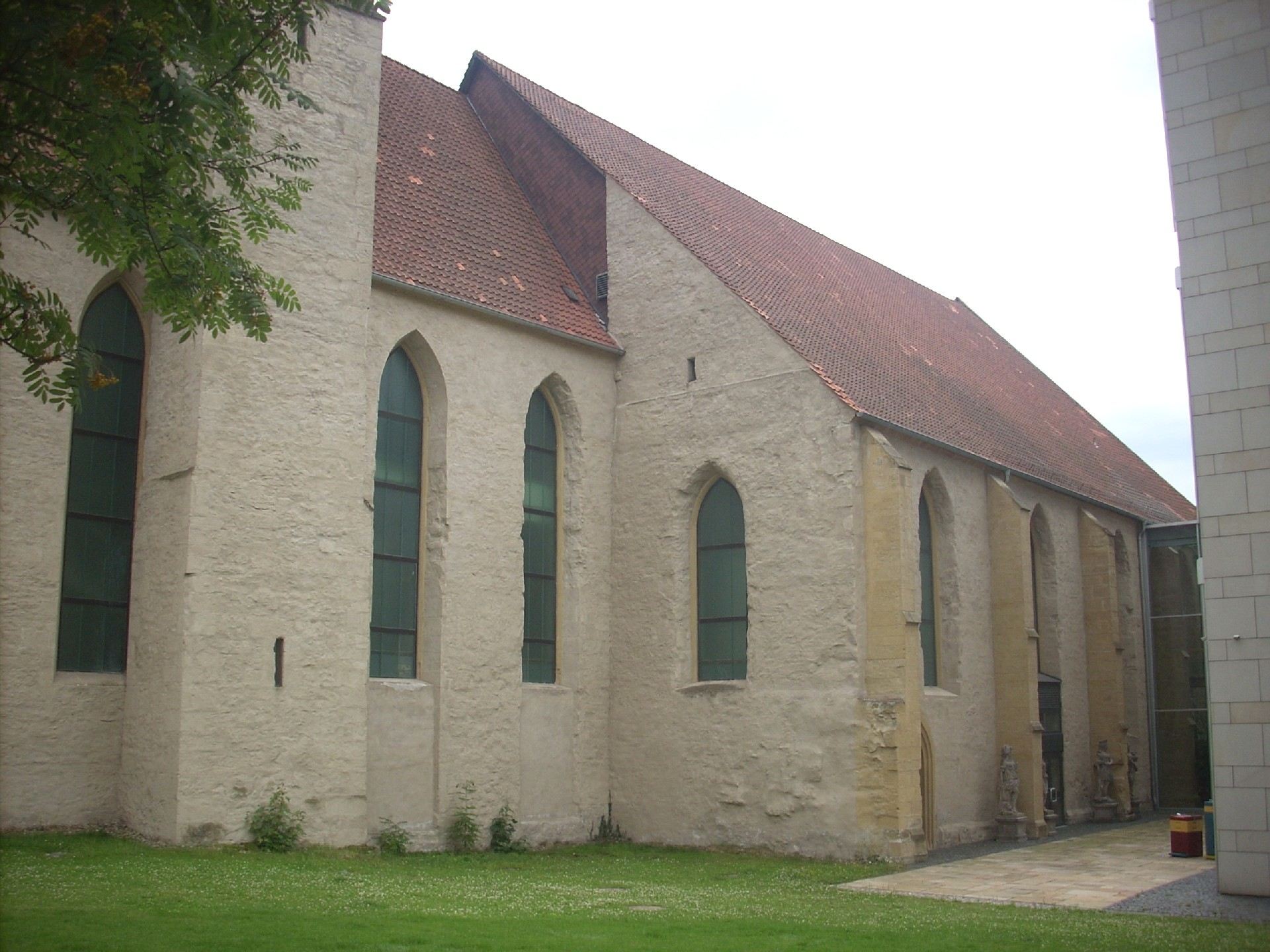 Ehemalige Franziskanerkirche St. Martini, Hildesheim, Langhaus